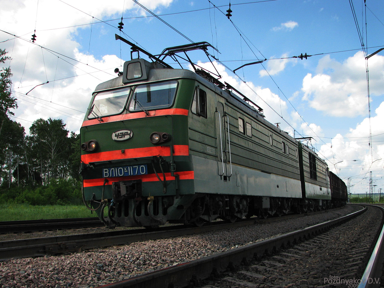 Сетевой № 12223392/12223400 С завода поступил в депо Львов-Запад. 1976 — передан в депо Московка. 2006 — передан в депо Тайга. 2007 — передан в депо Московка (как ВЛ10К). 2010 — передан в депо Тайга. СР Челябинский ЭРЗ 03.1978 г. КР-1 Екатеринбургский ЭРЗ 01.1982 г. КР-2 Екатеринбургский ЭРЗ 04.1988 г. СР Екатеринбургский ЭРЗ 06.1992 г. КР-1 Екатеринбургский ЭРЗ 05.2001 г. КРП Челябинский ЭРЗ 06.2007 г. СР Московка (ТЧР) 05.2011 г. Секция А на ЧЭРЗ